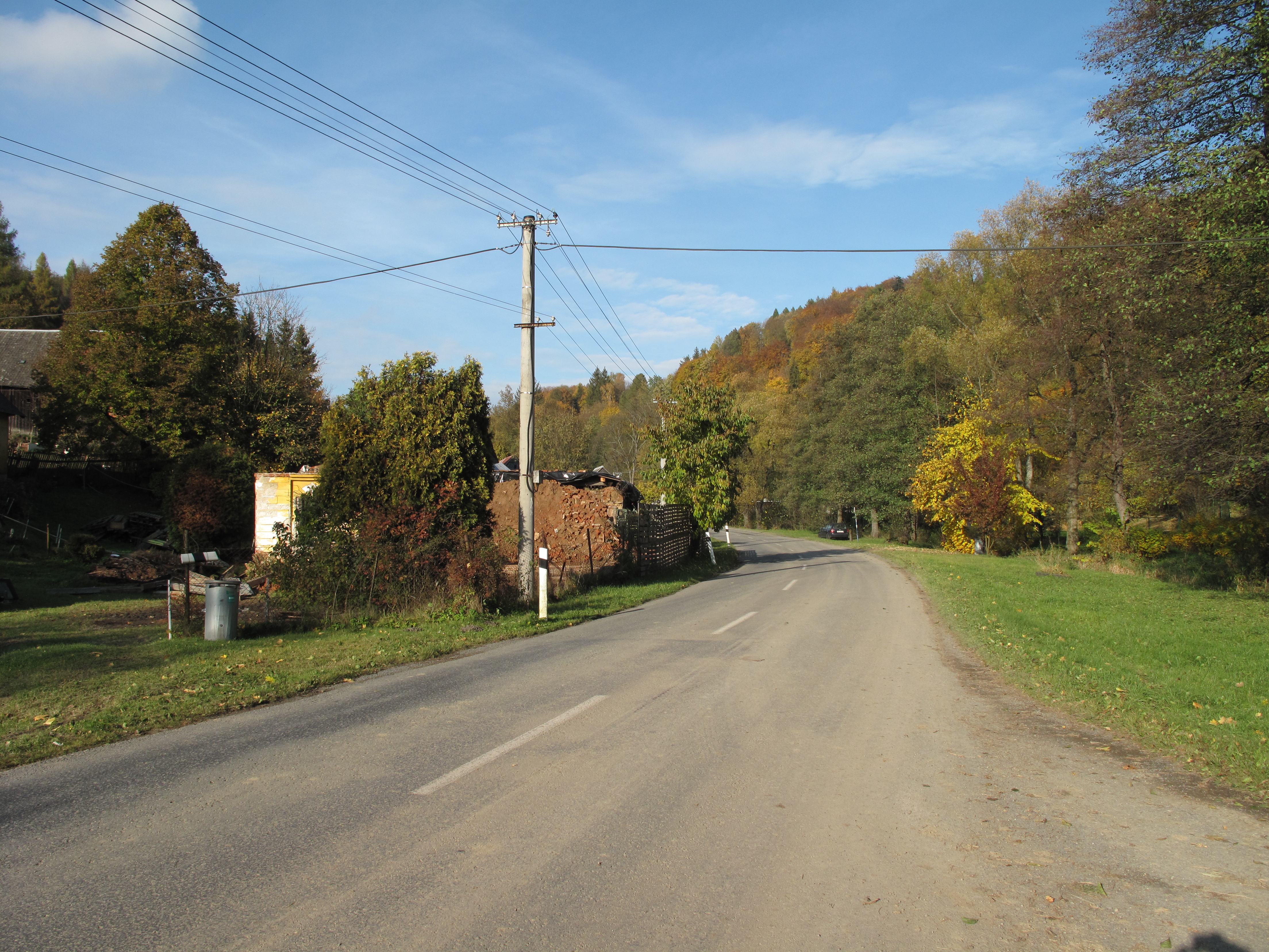 Trhavice. Okres Olomouc, Česká republika.